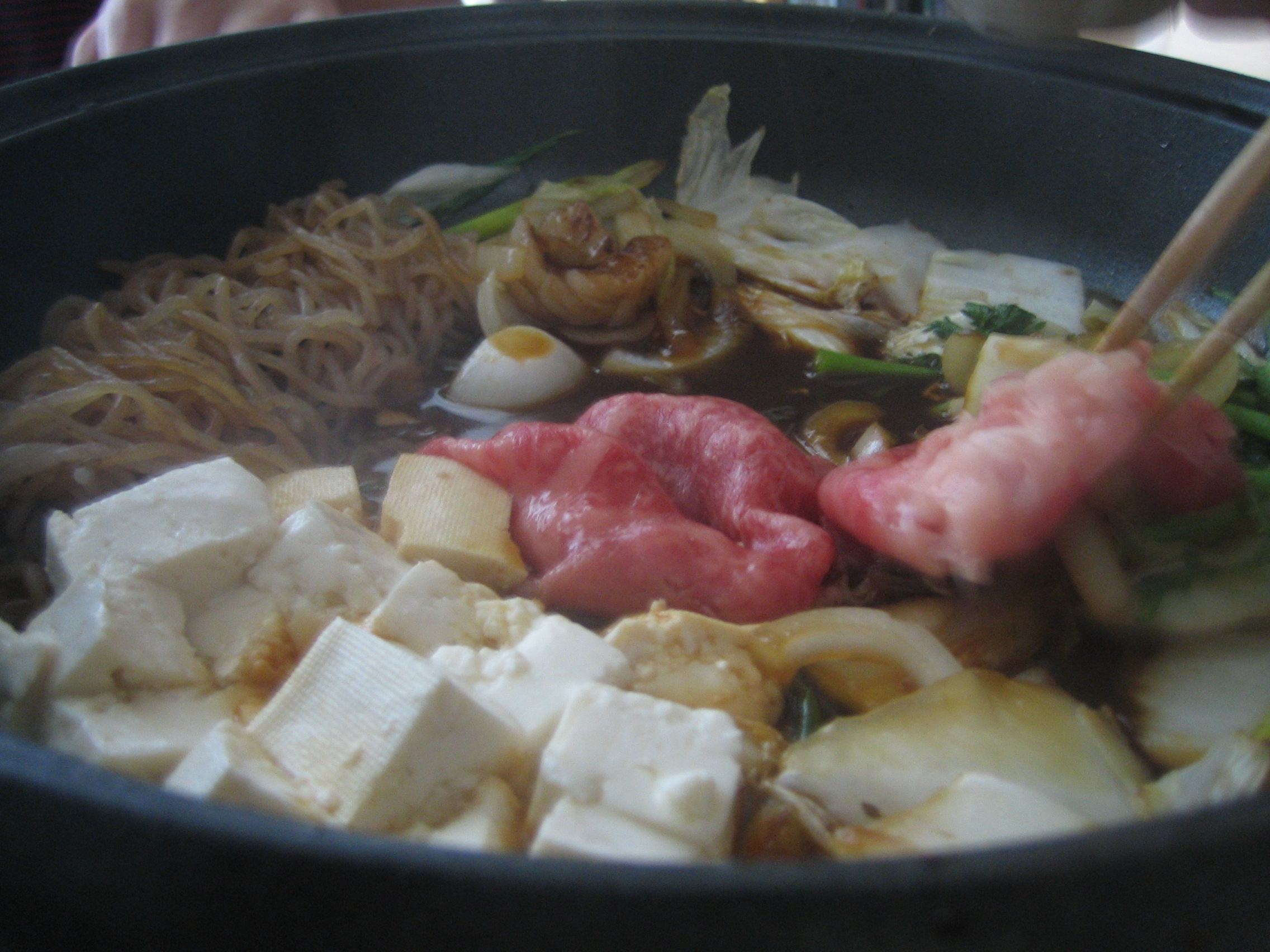 Bowl of sukiyakisukiyaki 007